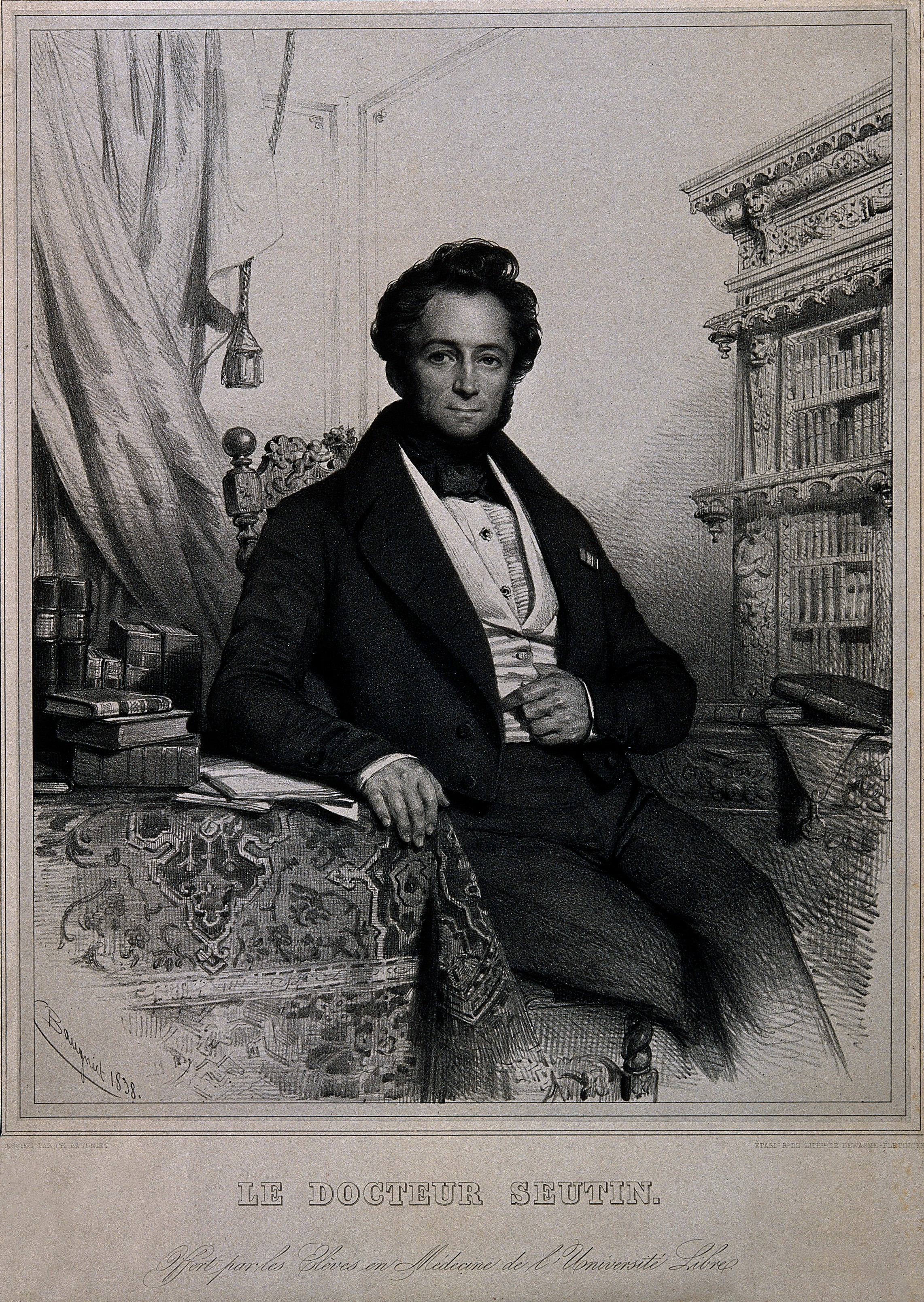 Genre/Technique: Portrait prints. Lithographs. Subject name: Seutin, Louis-Joseph Ghislain, Baron, 1793-1862.